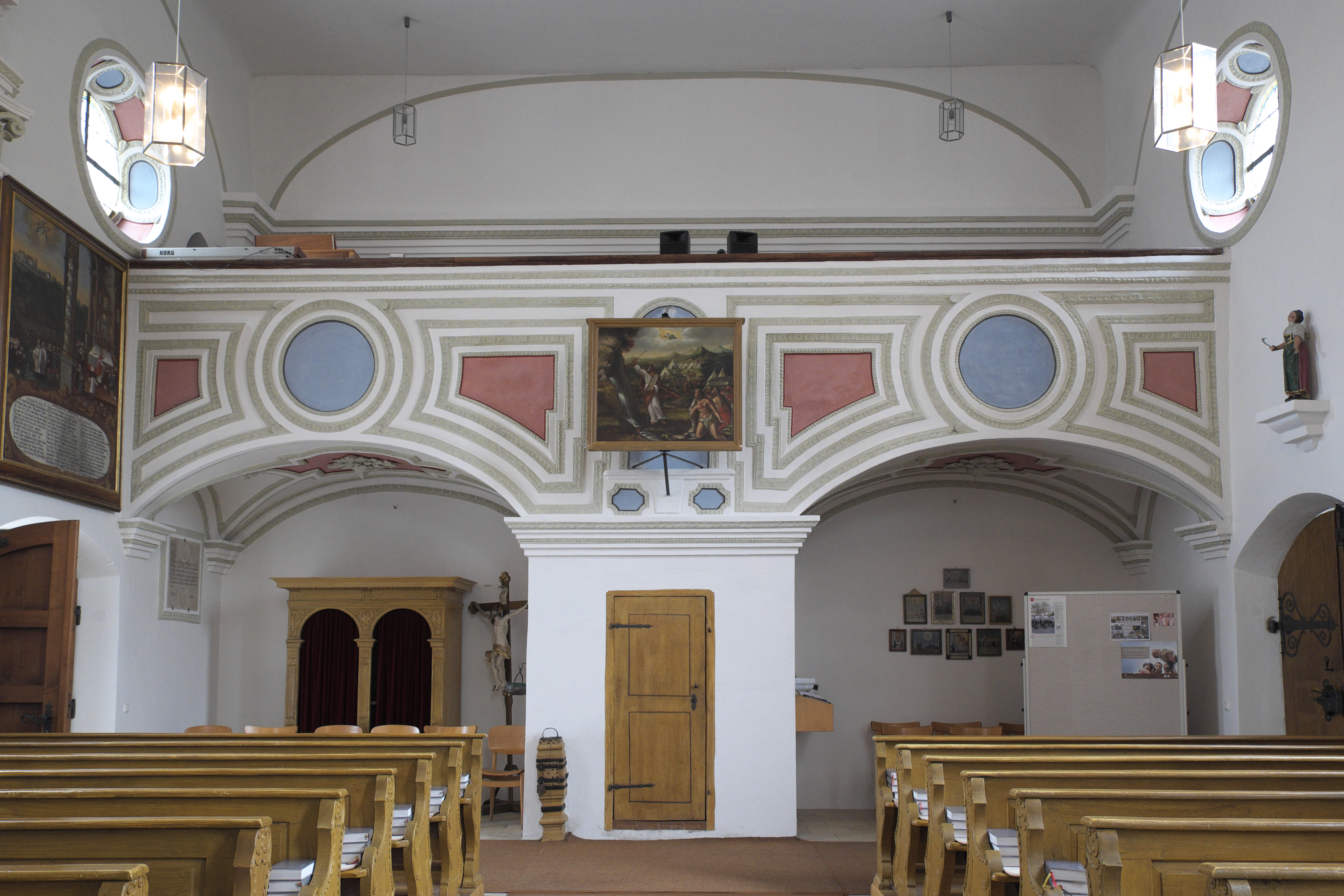 Katholische Wallfahrtskirche Heilig Blut in Einsbach, einem Ortsteil von Sulzemoos im Landkreis Dachau (Bayern/Deutschland), Westempore